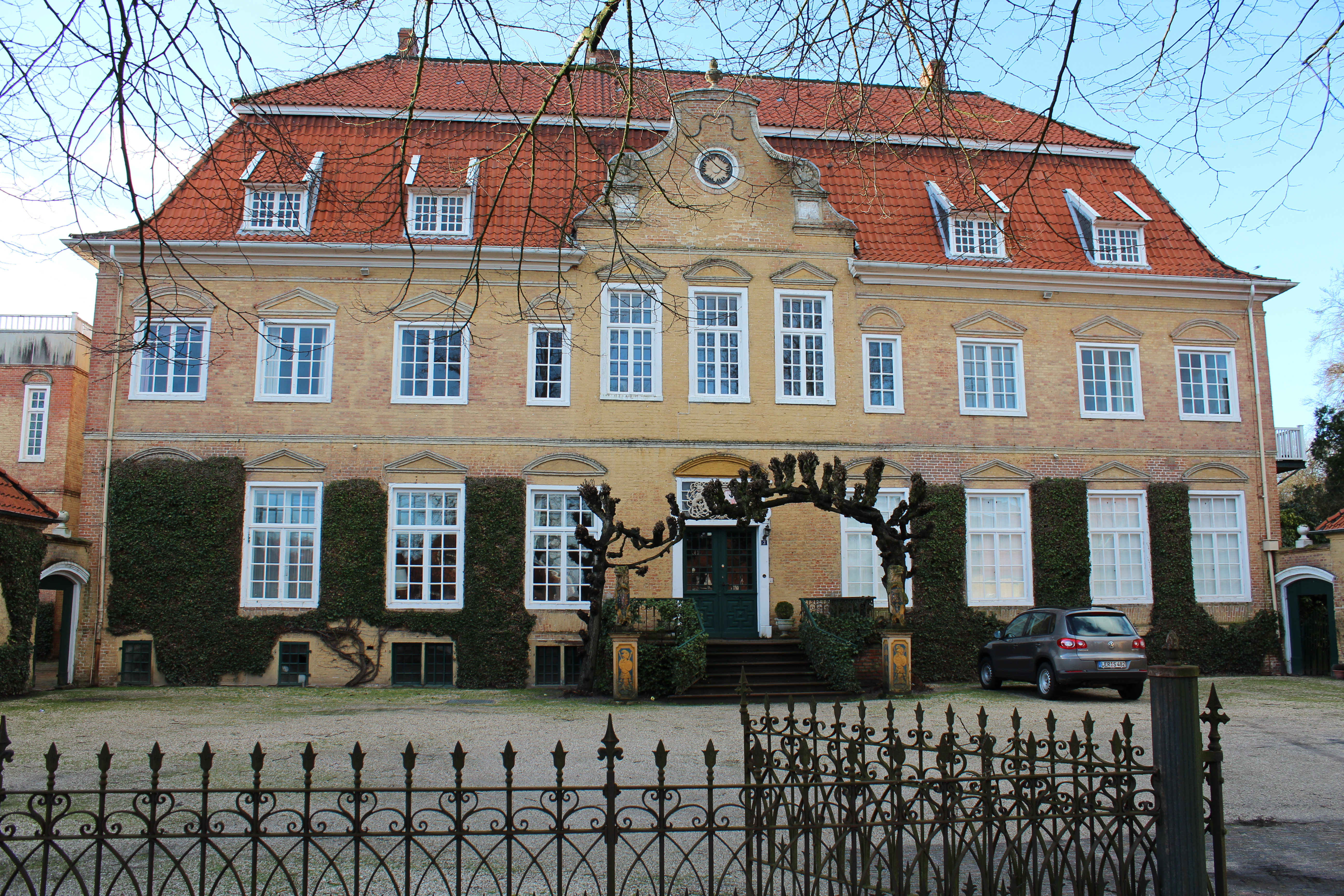 Vorderansicht der Philipsburg in Leer/Loga